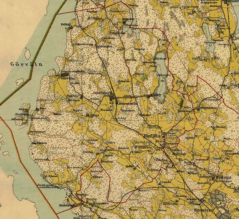 Del av Karta över Sollentuna härad, upprättad 1901-1902. Rikets Allmänna Kartverk, Ekonomiska avdelningen, Stockholms län.